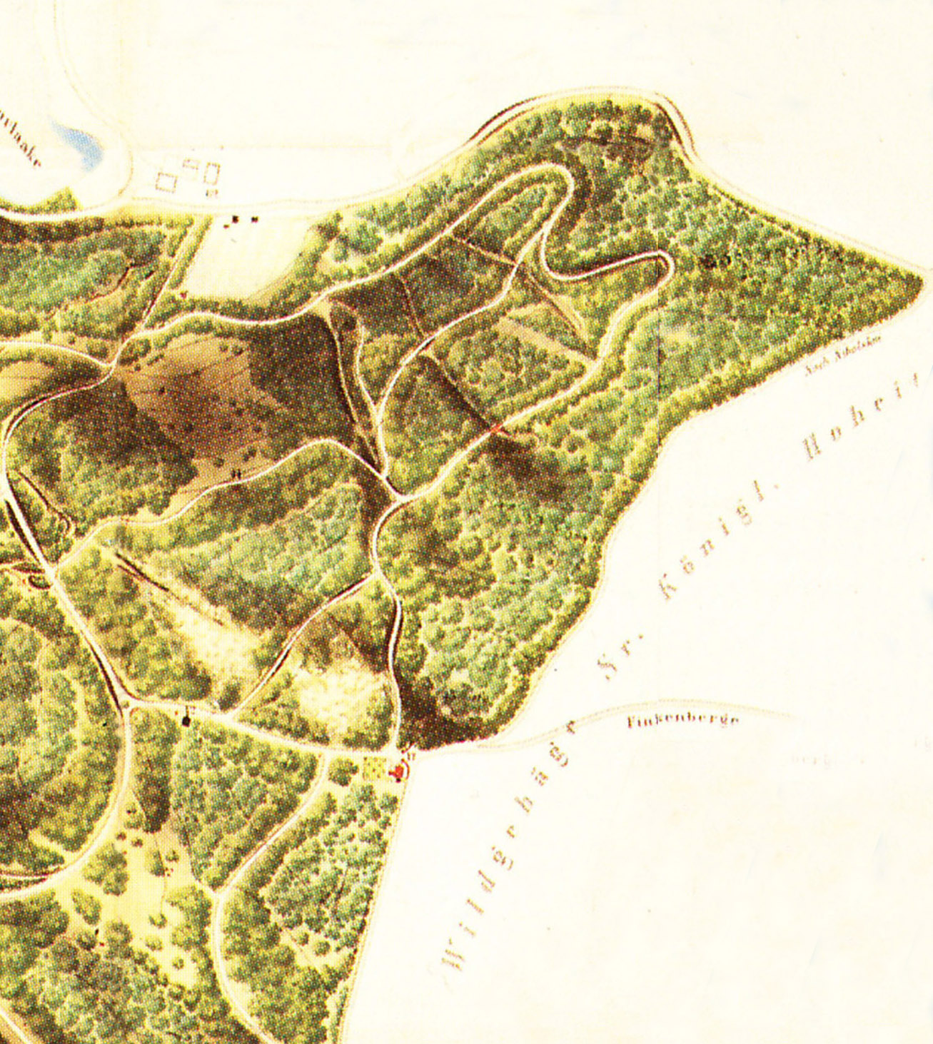 Kraatzplan 1862, Ausschnitt Carpathen